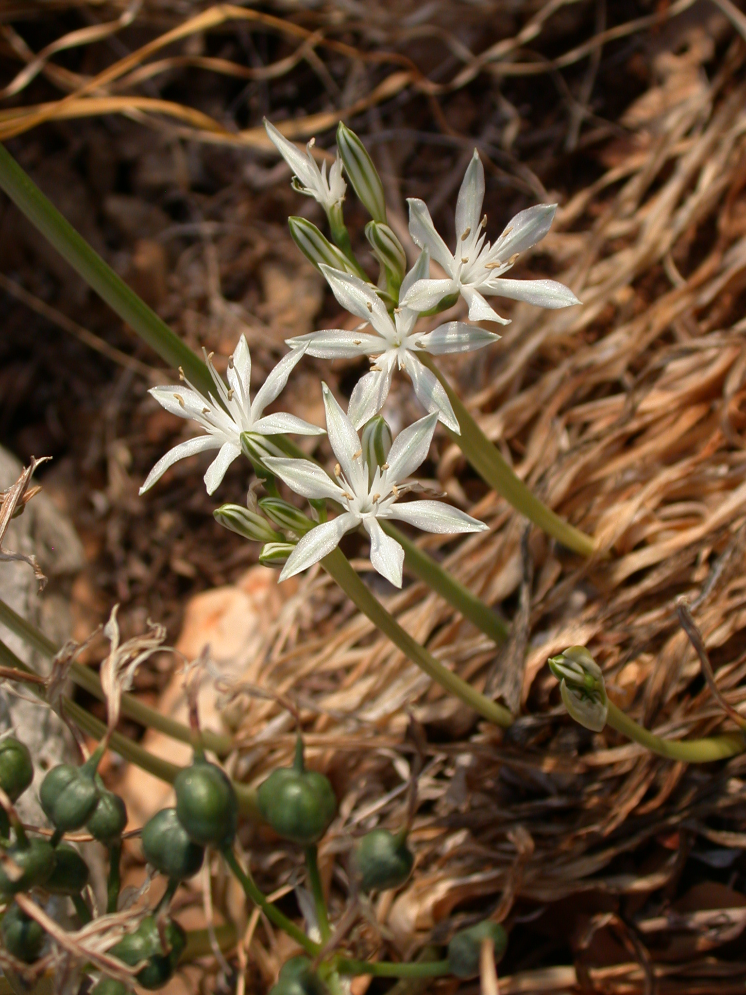 Pancratium parviflorum Delile (חבצלת קטנת-פרחים), Mount Carmel, Israel, October 20, 2007.